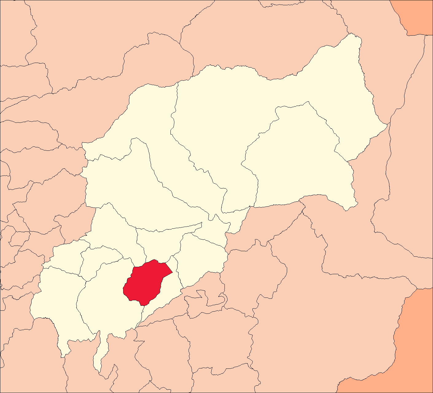 Área del distrito de San Francisco de Cayrán.